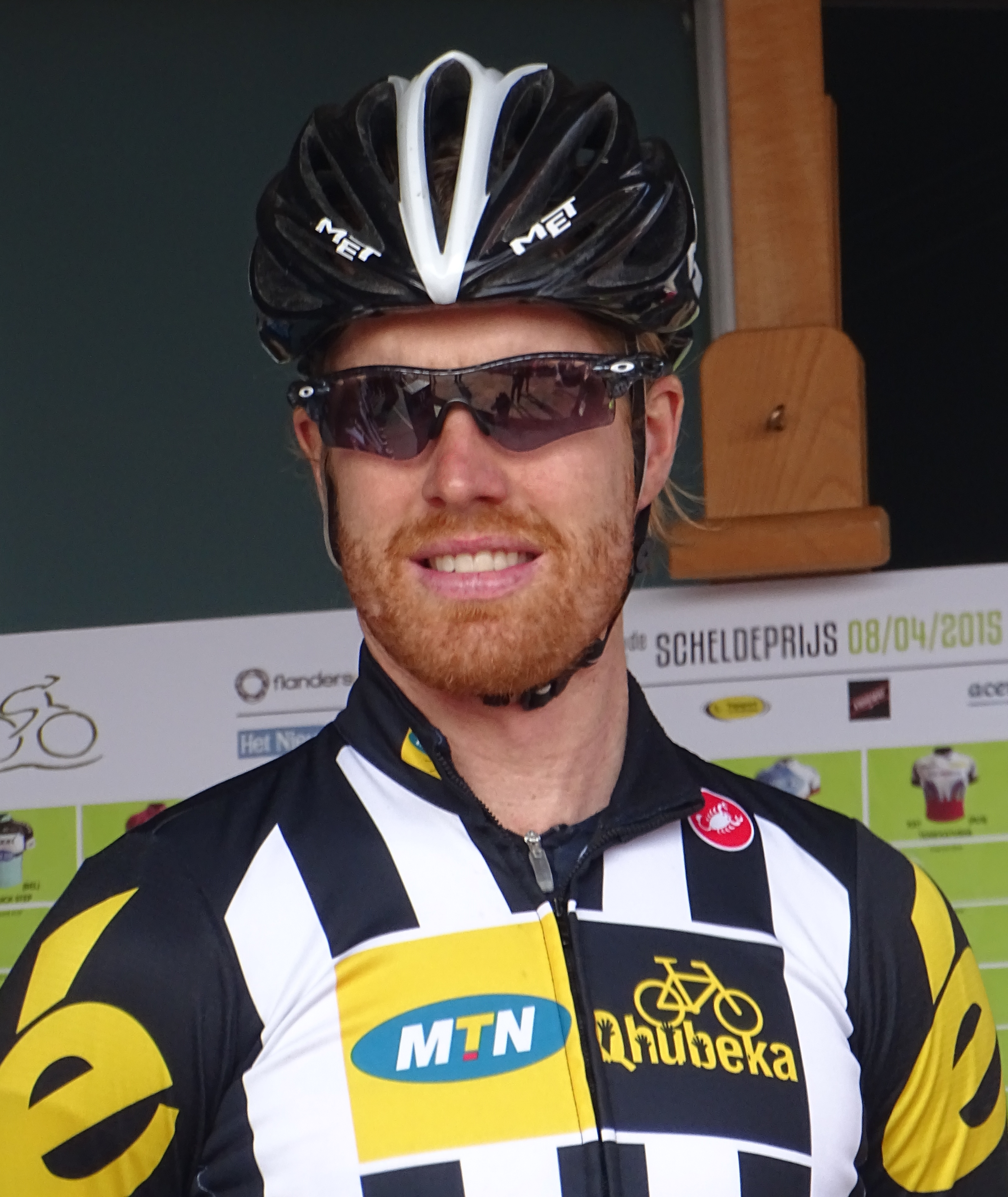 Reportage réalisé le mercredi 8 avril à l'occasion du départ du Grand Prix de l'Escaut 2015 à Anvers, Belgique.